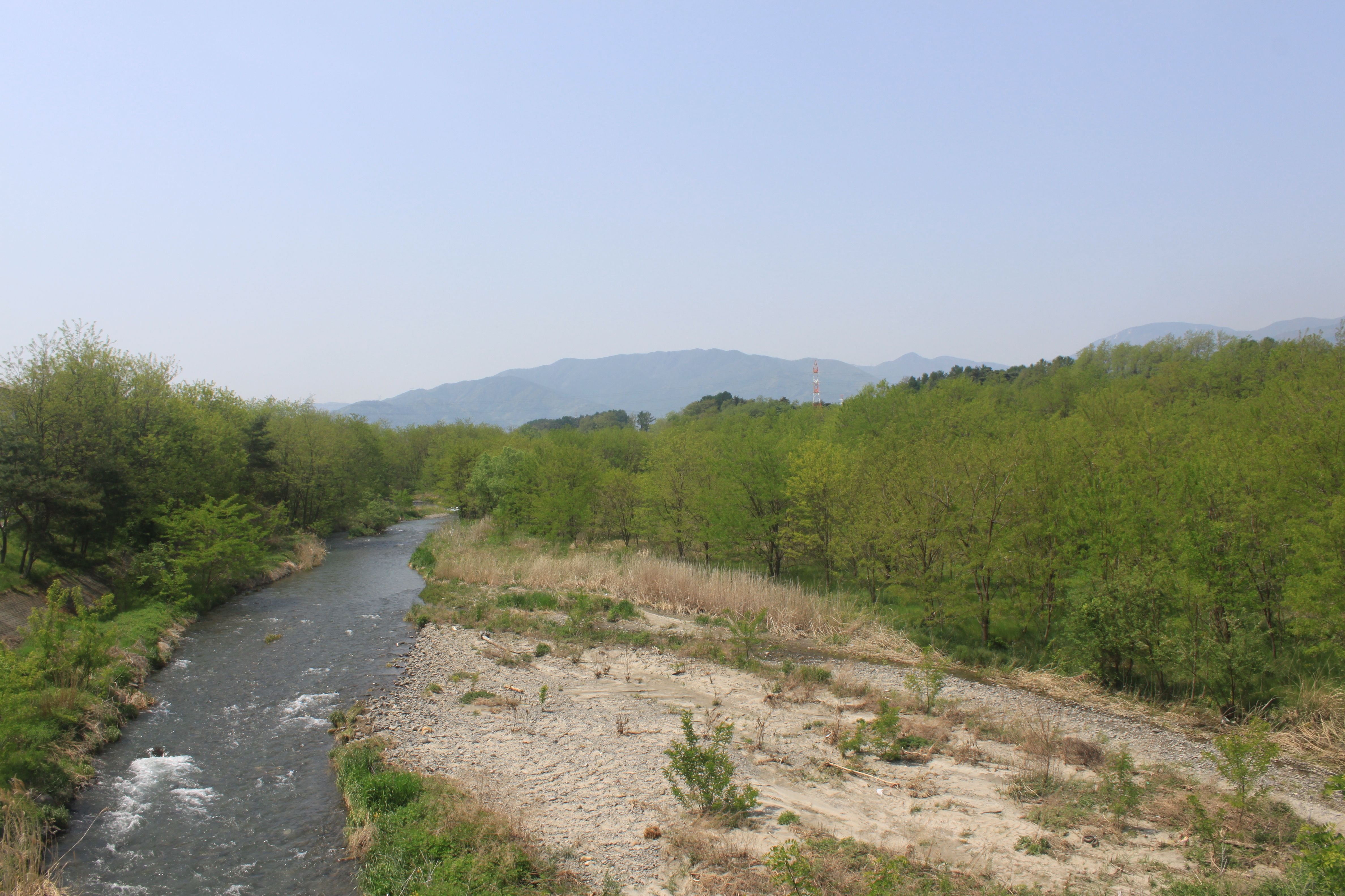 鎖川